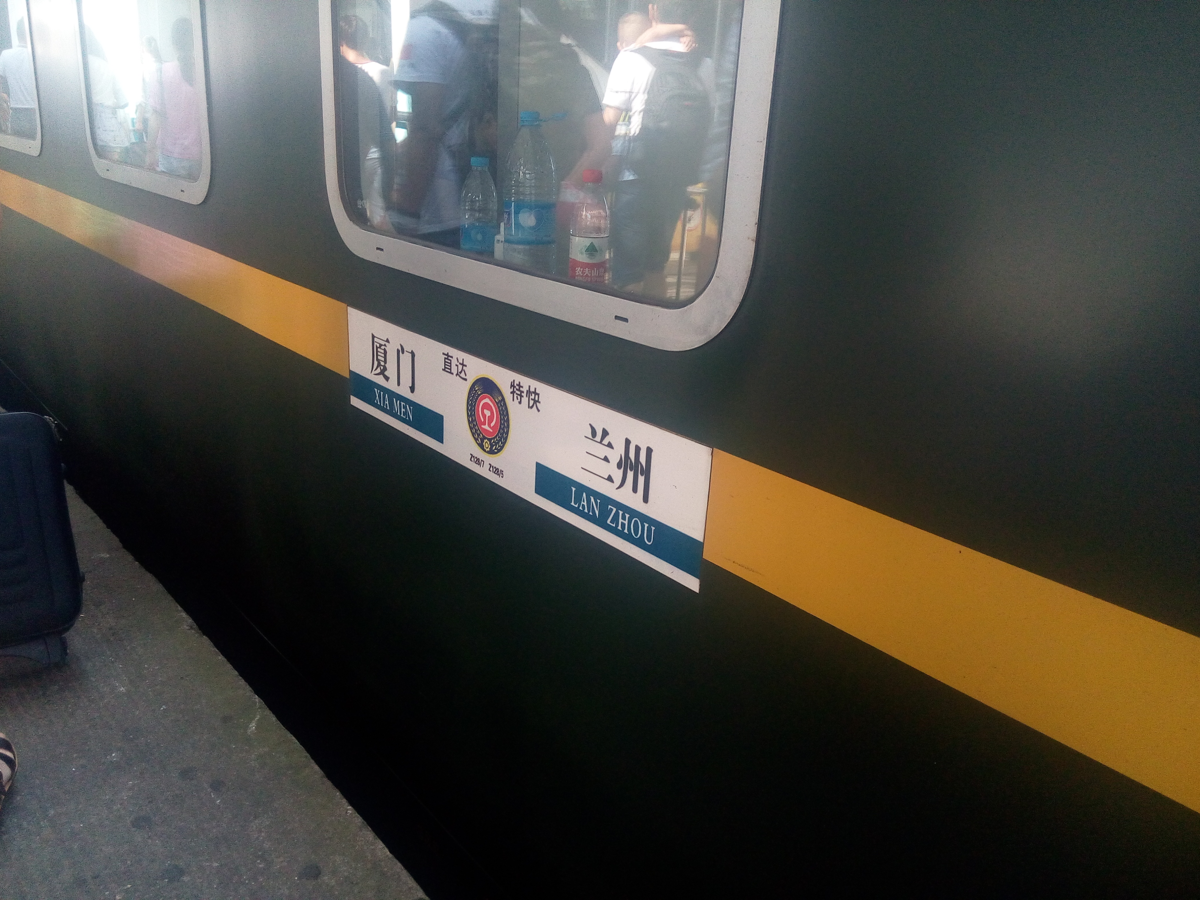 南昌站的Z126/127、Z128/125次列车水牌和25T车底（这节车厢刷绿）